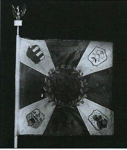 prawa strona sztandaru 4 psap